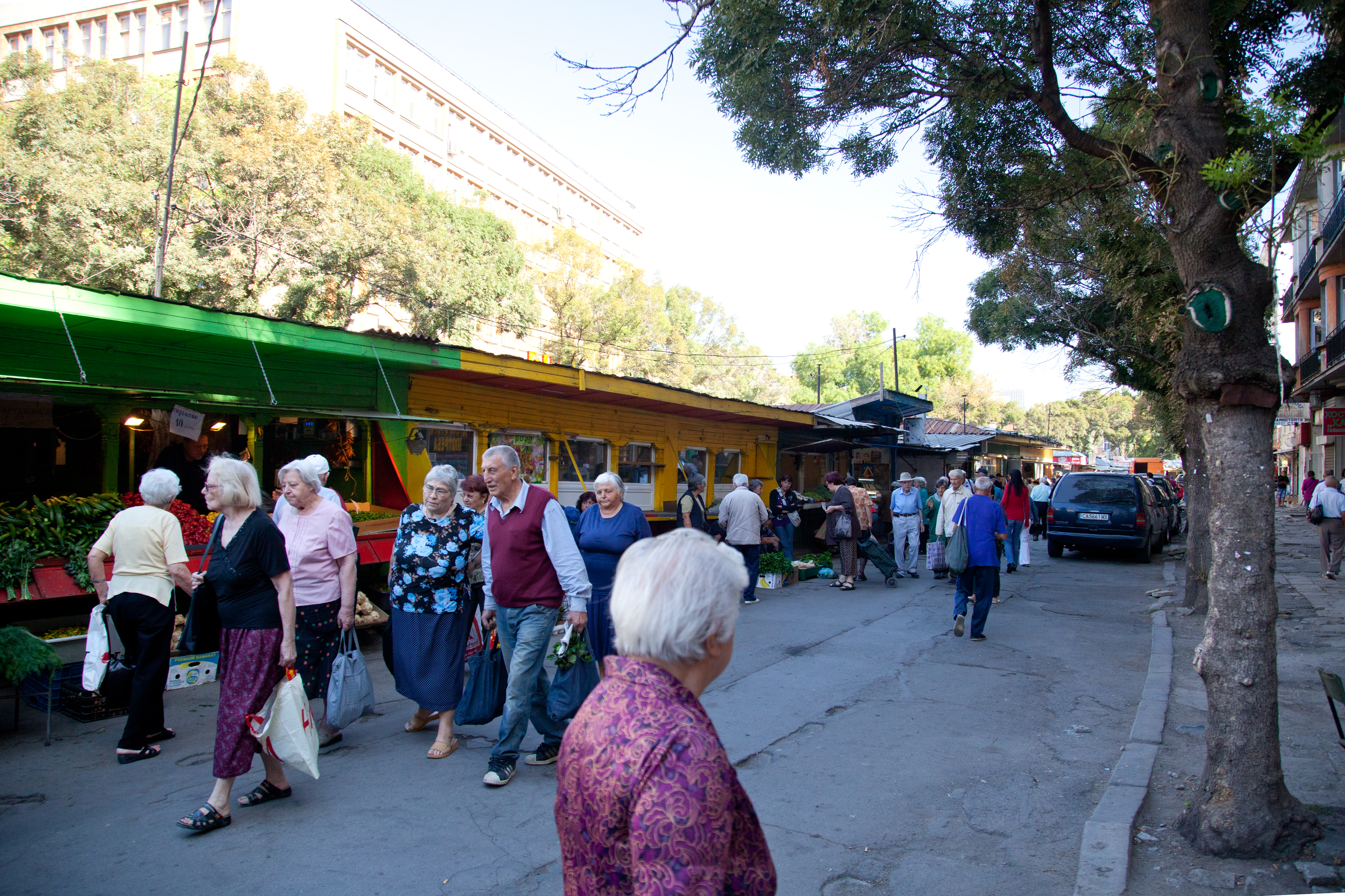 Sofia; der "Frauenmarkt" (Schenski pasar)